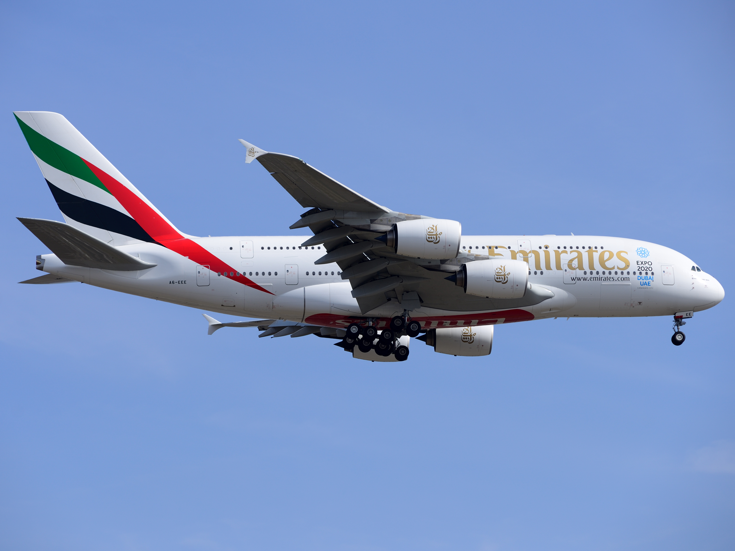 Emirates A380-800 A6-EEE